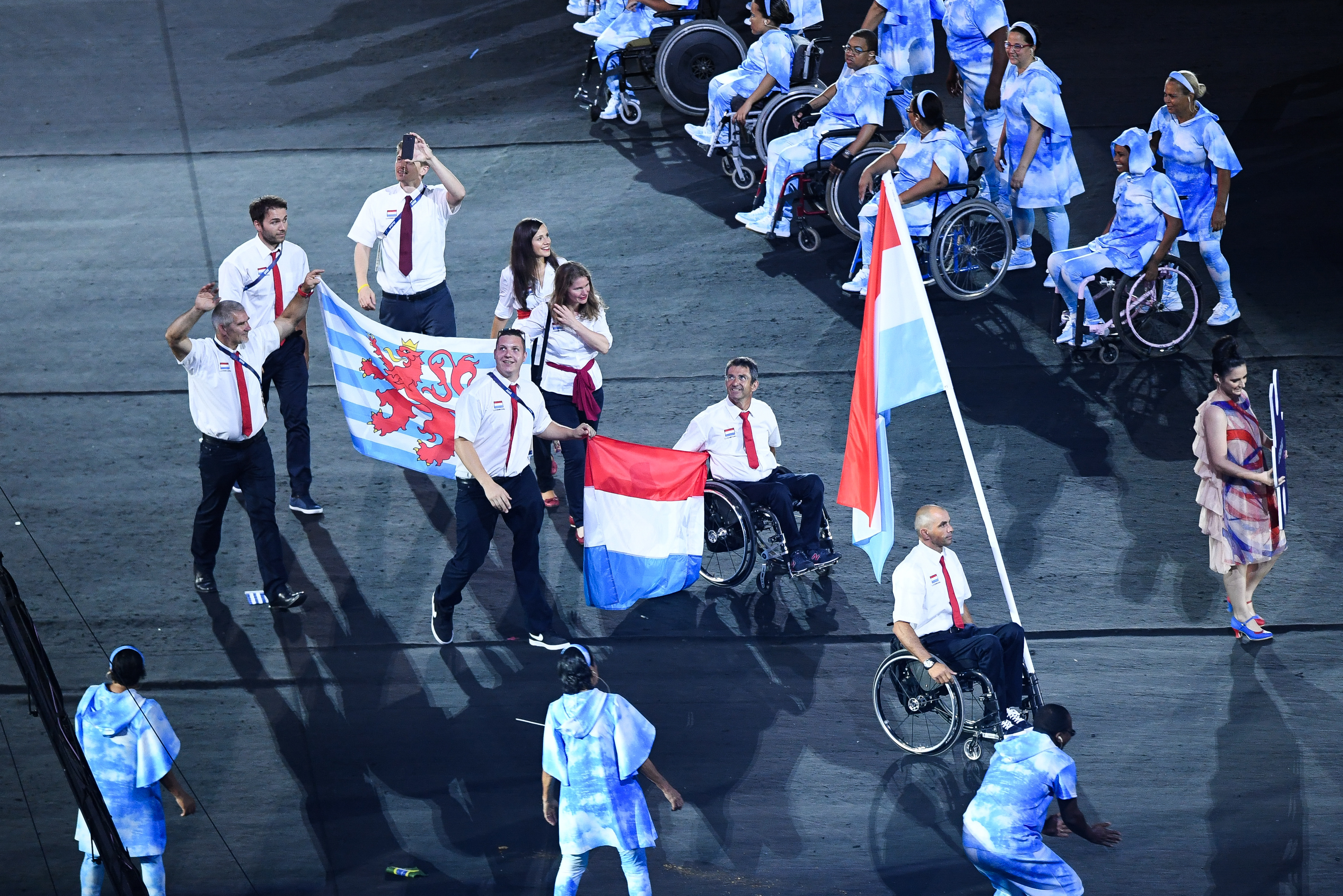 Rio de Janeiro - Cerimônia de abertura dos Jogos Paralmpicos Rio 2016 no Estdio do Maracanã (Tomaz Silva/Agência Brasil)